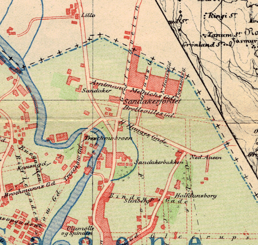 Sandaker, Oslo.